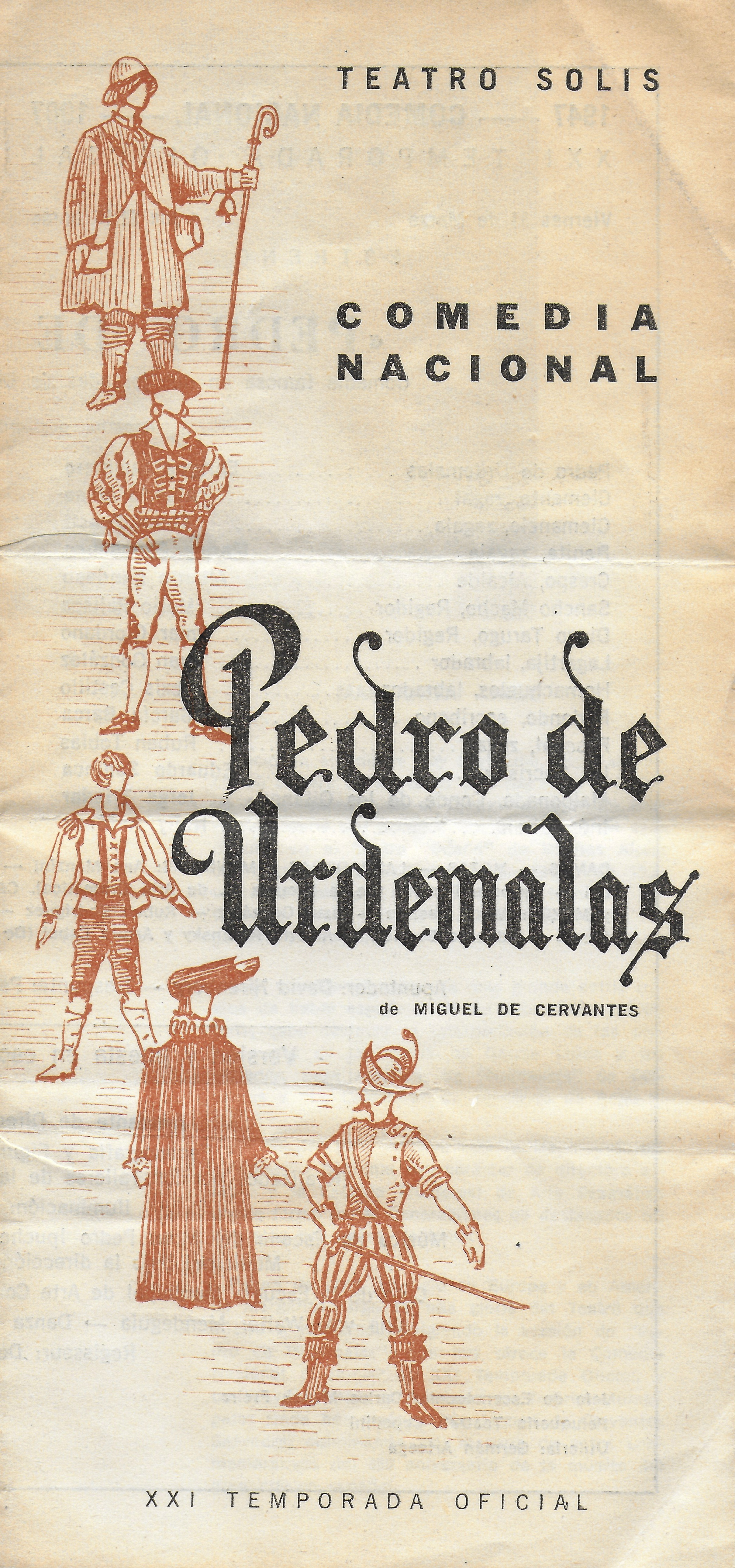 Programa de mà de l'obra de teatre Pedro de Urdemalas, Montevideo, 1967